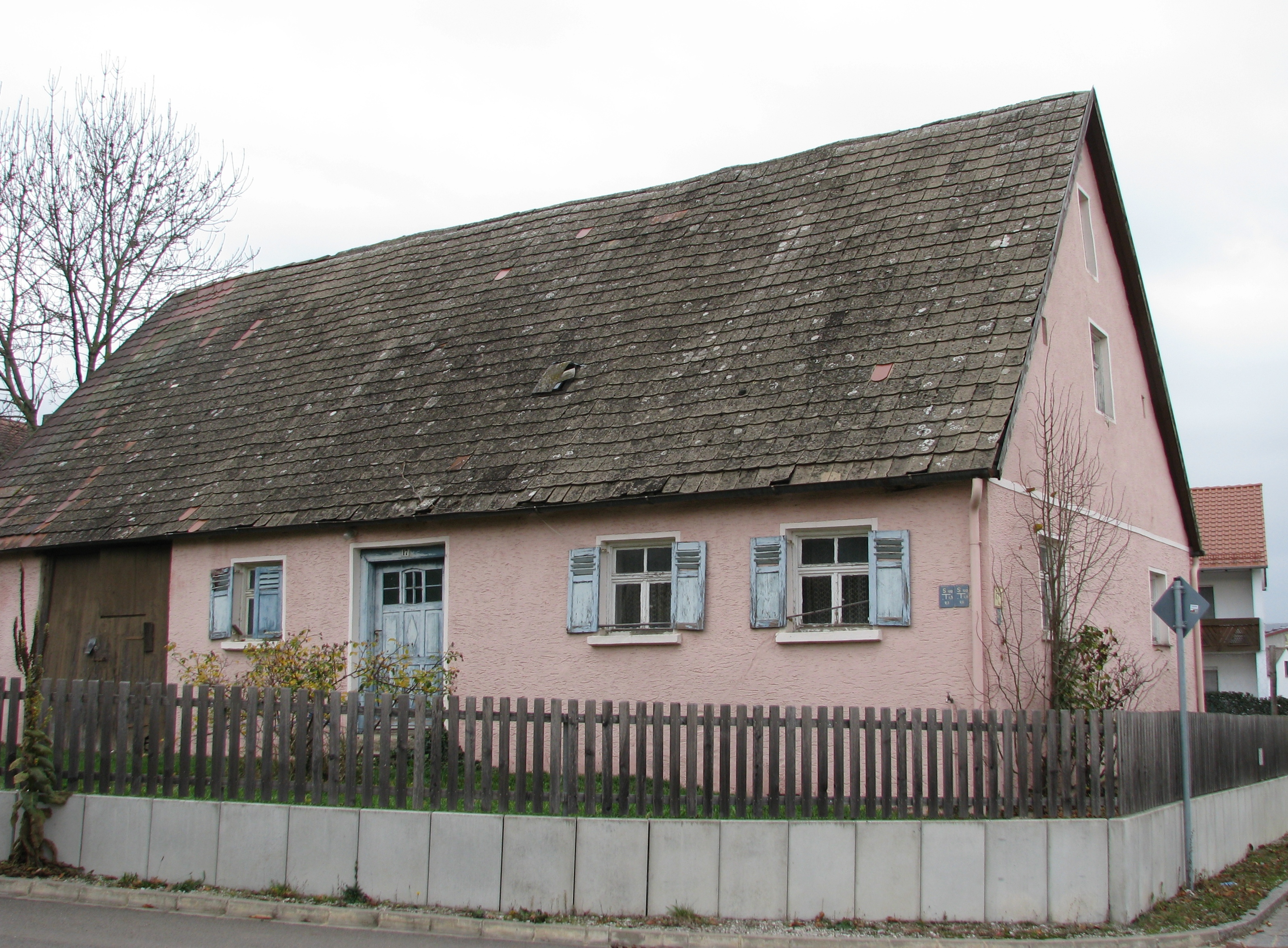 Großberghausen, Ortsteil von Freystadt im Landkreis Neumarkt in der Oberpfalz, Wohnstallhaus